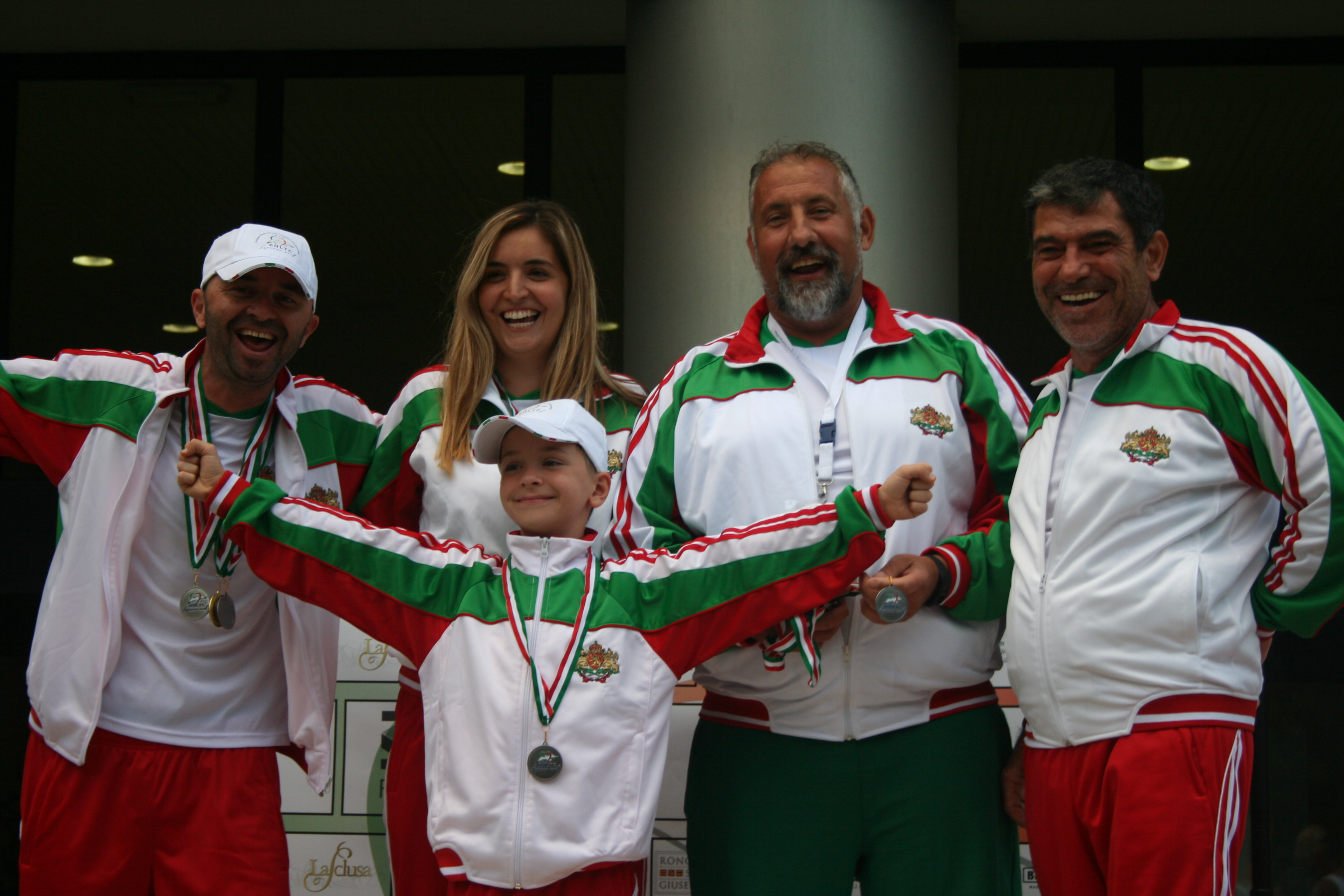 Българският отбор в Лигнано Сабиадоро